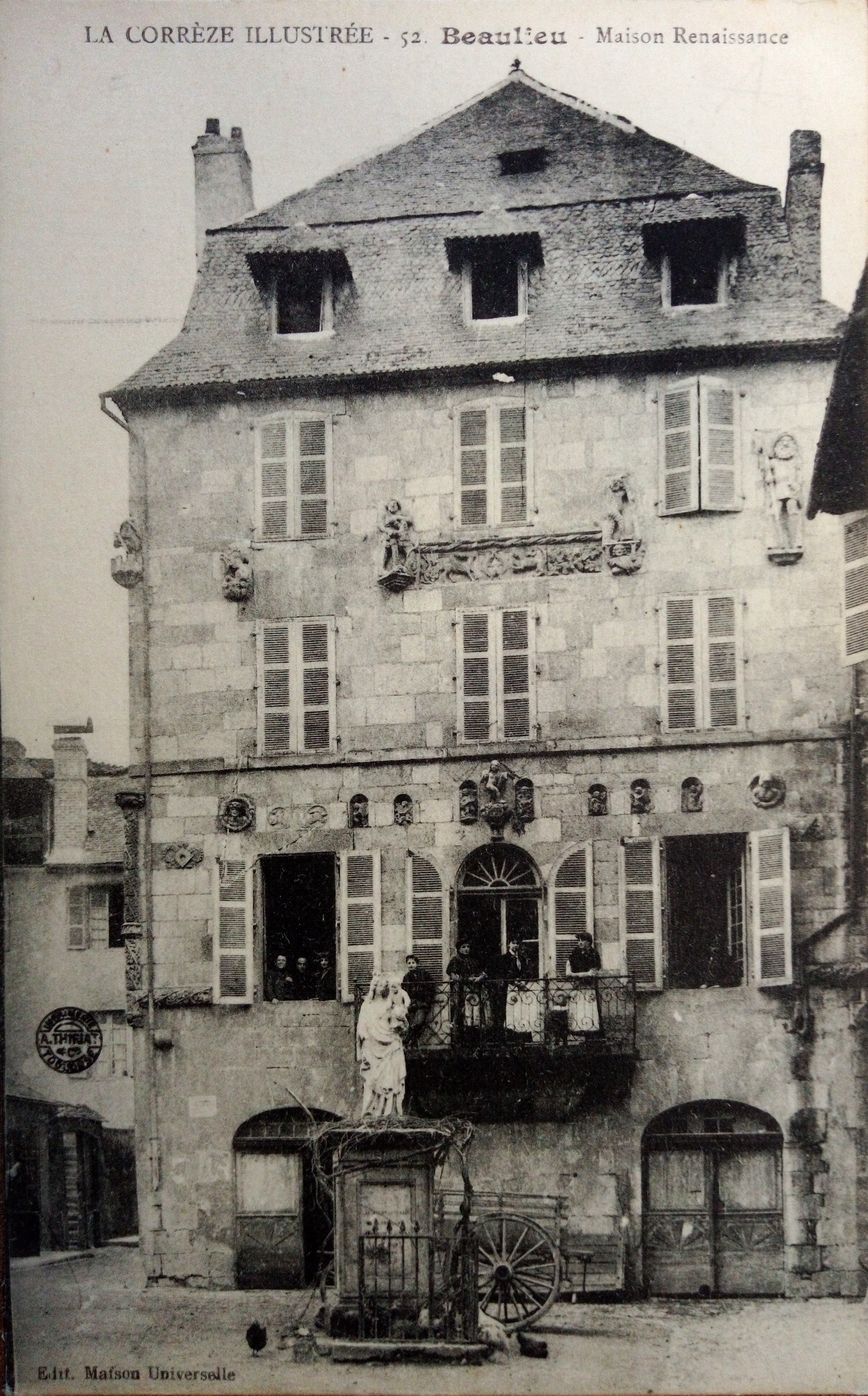 Carte postale du début du XXe siècle représentant la Maison Renaissance